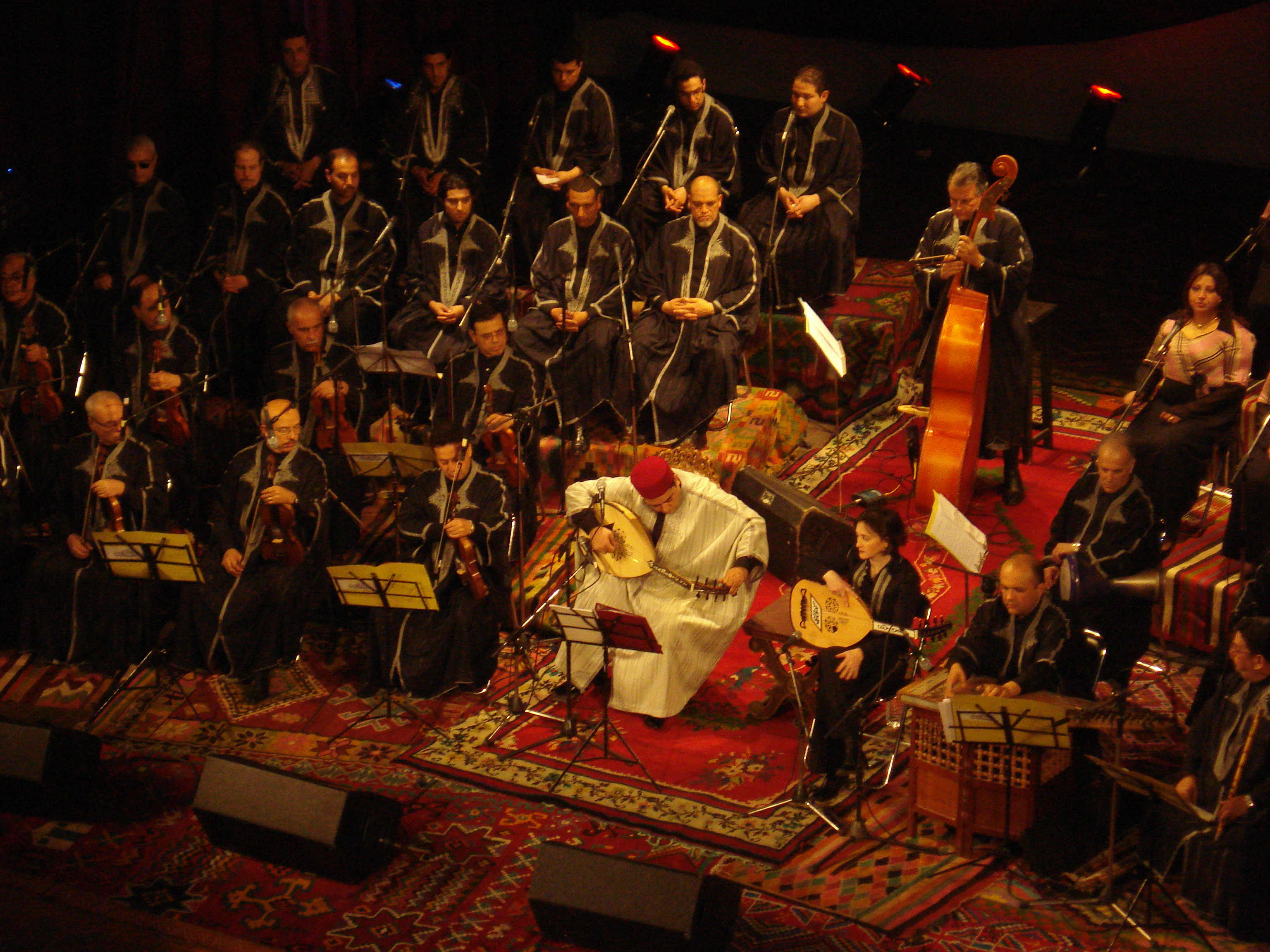 Zied Gharsa (portant une joubba blanche) accordant son luth au milieu de l'orchestre de la Rachidia lors de leur concert au théâtre municipal de Tunis le 27 février 2009, Tunis, Tunisie